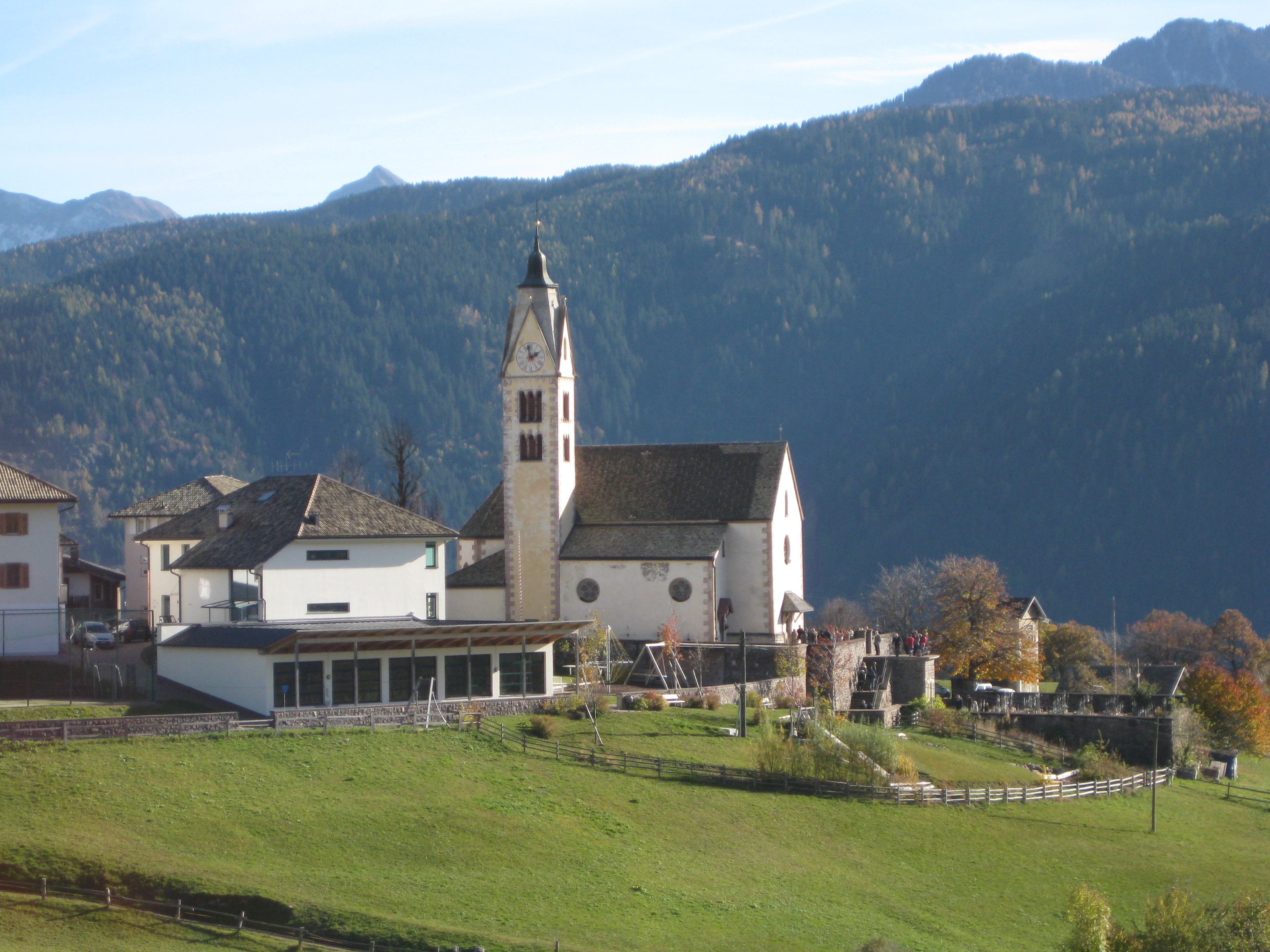 Pfarrkirche St. Katharina in Altrei (Südtirol)